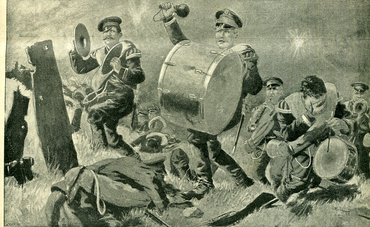 La bravoure des belligérants. Attaque d'une position par un régiment Russe, musique en tête